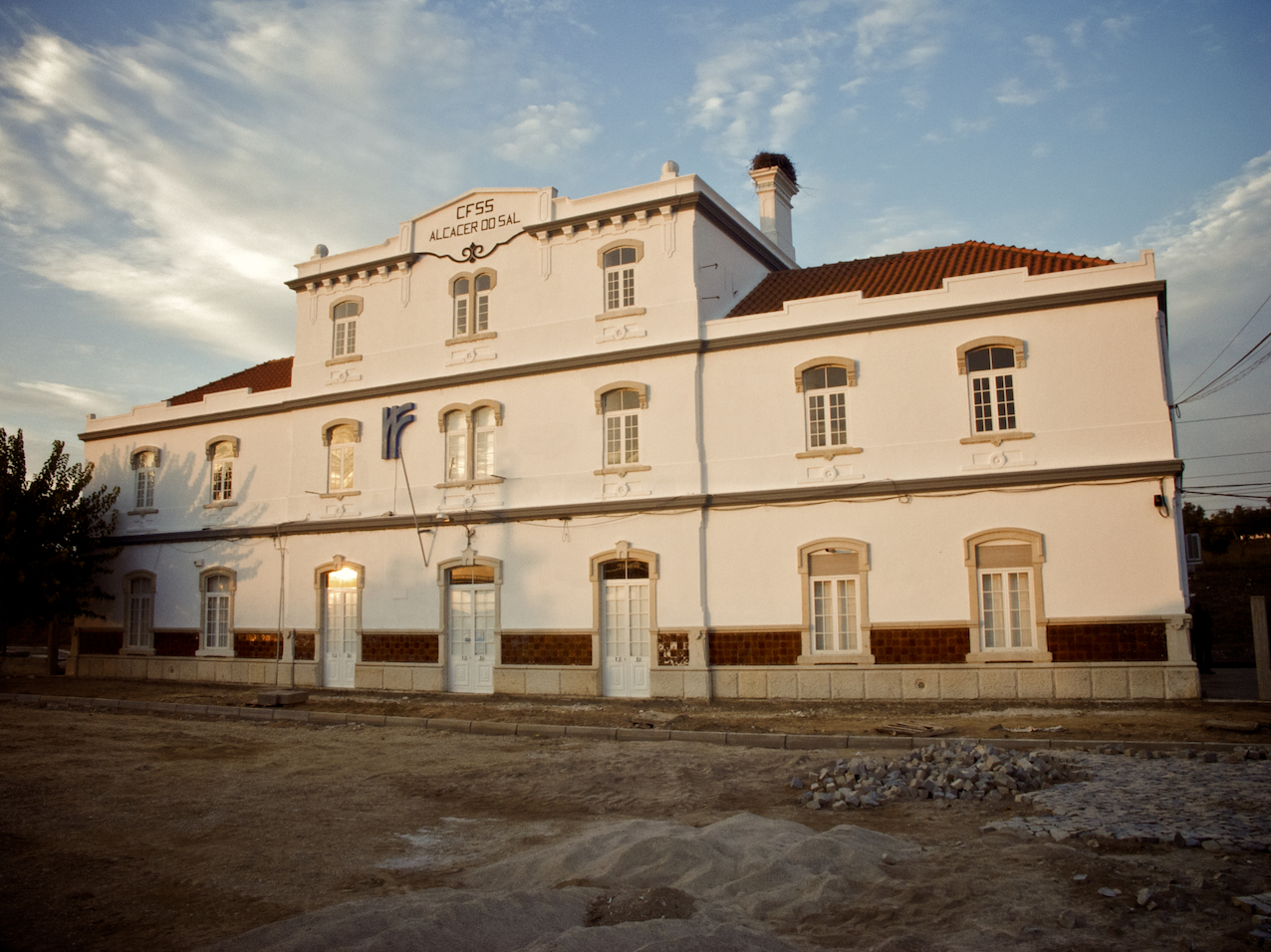 Tipo: EC Estação de Concentração Local: Alcácer do Sal [Linha do Sul, PK 78] Data e hora: 21 de Outubro de 2008 [18h25]